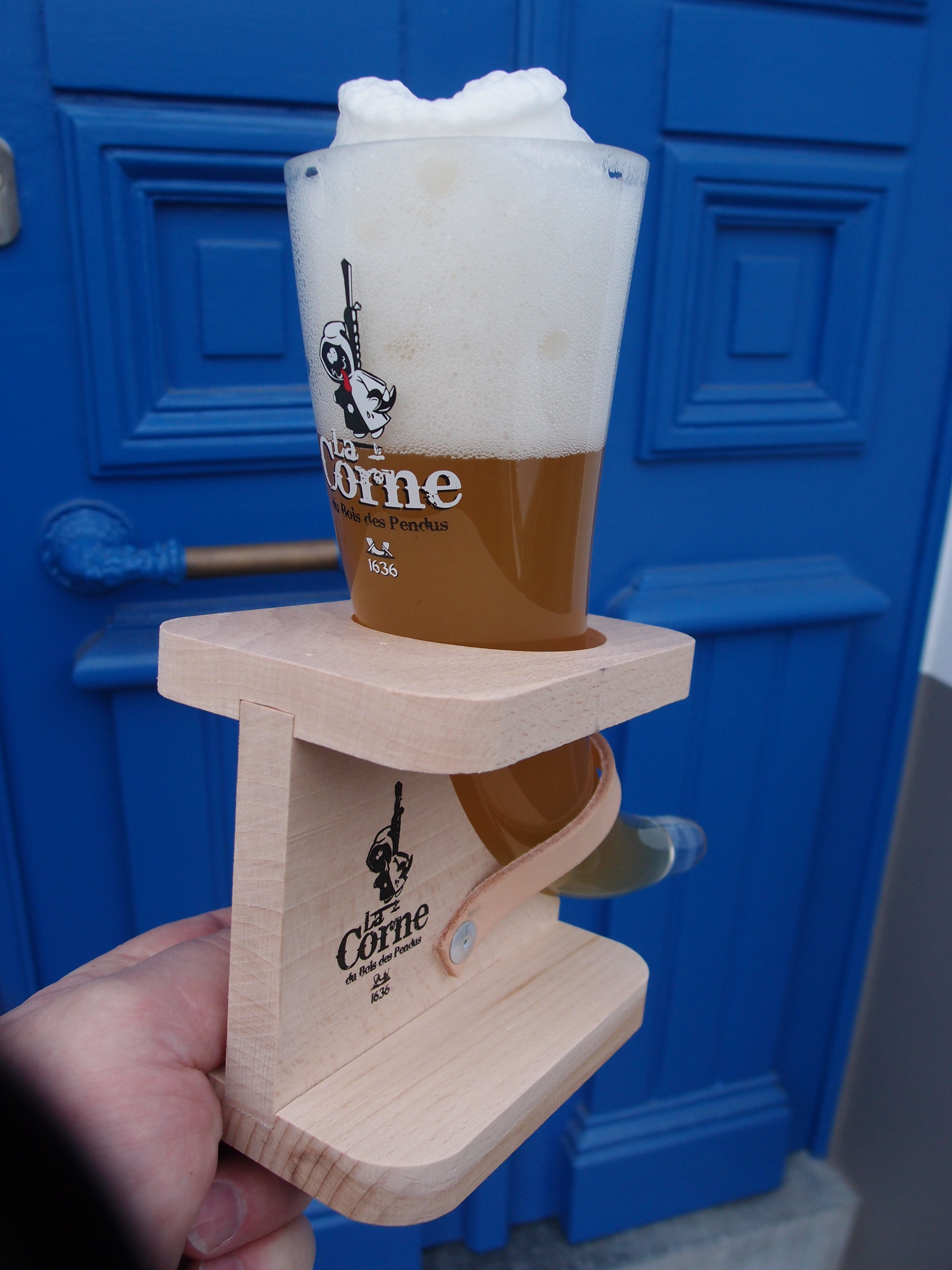 Glas und -halter des belg. Biers "La Corne du Bois des Pendus" Datum: 05.01.2014 Urheber: M. Pfeiffer alias Gordito1869 Quelle privates Fotoarchiv des Urhebers